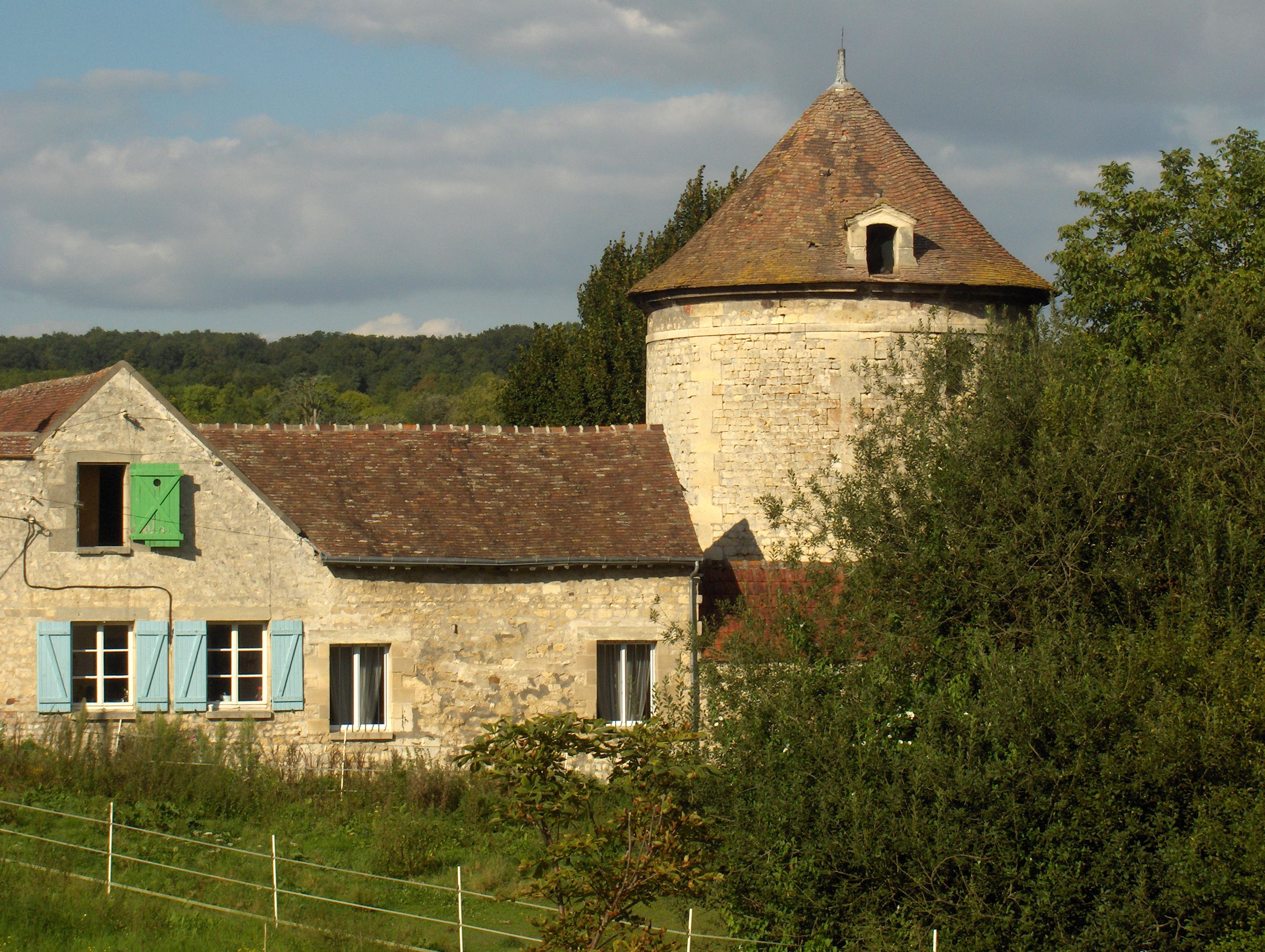 Colombier de Boulonville (monument historique) à Parmain